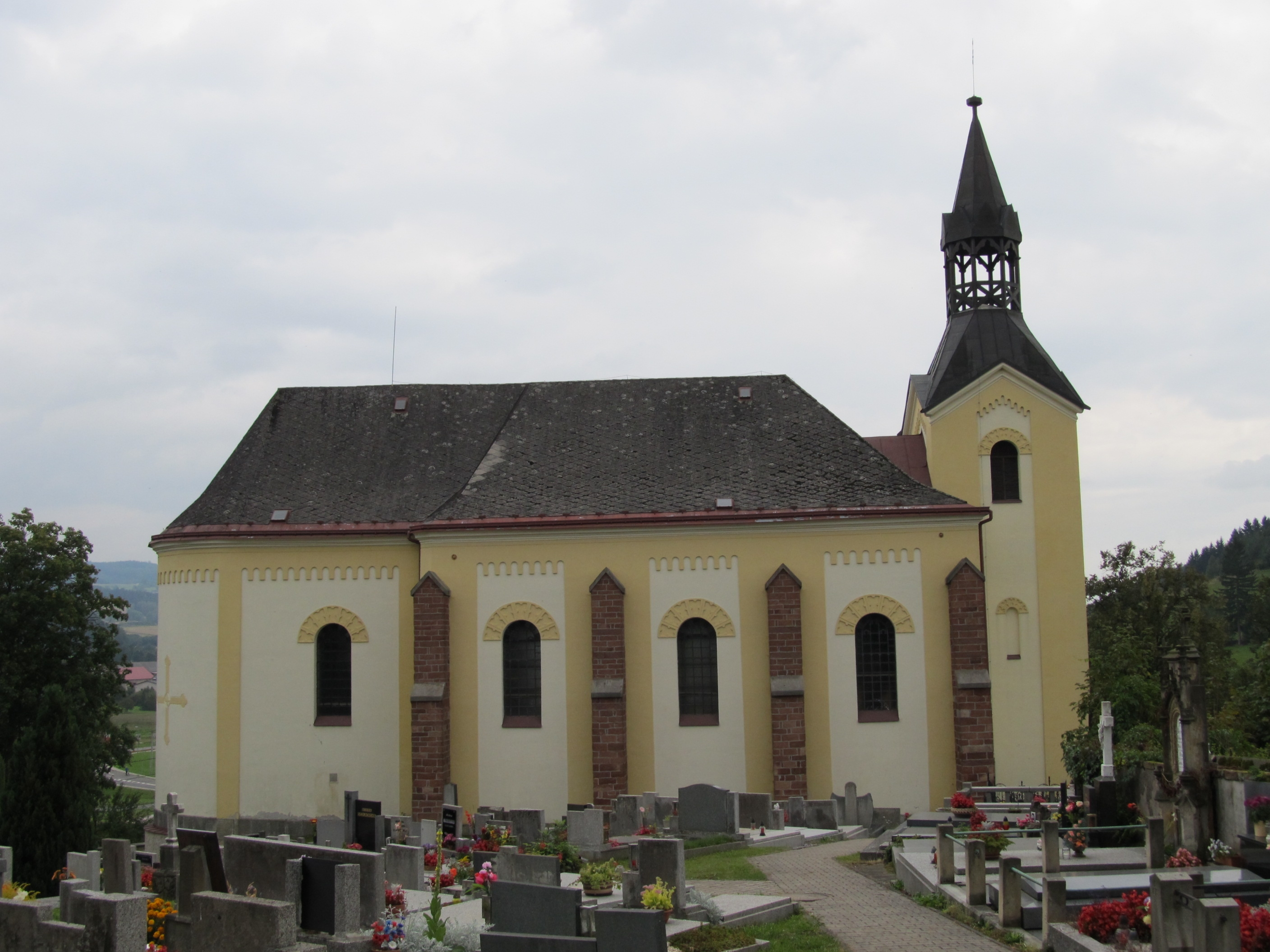 Kostel sv. Bartoloměje (Batňovice), Batňovice